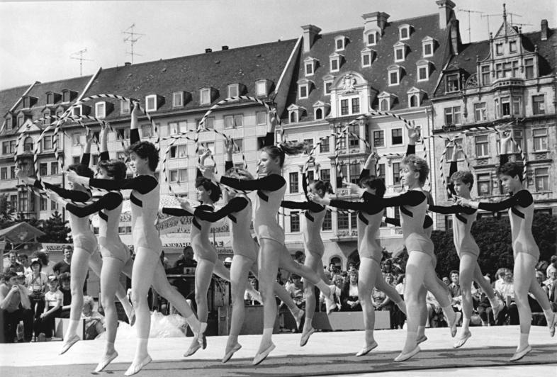 Leipzig, Sachsenplatz, Sportfest, Turndarbietung ADN-ZB Kasper 30.7.87 Leipzig: Sportfest -Bereits zum achten Mal dabei: die vor 34 Jahren gegründete Sportwerbegruppe der BSG Lokomotive Elsterwerda (Bez. Cottbus). "Spitzen"-Leistungen zeigten die Mädchen bei ihrem Programm auf dem Leipziger Sachsenplatz.